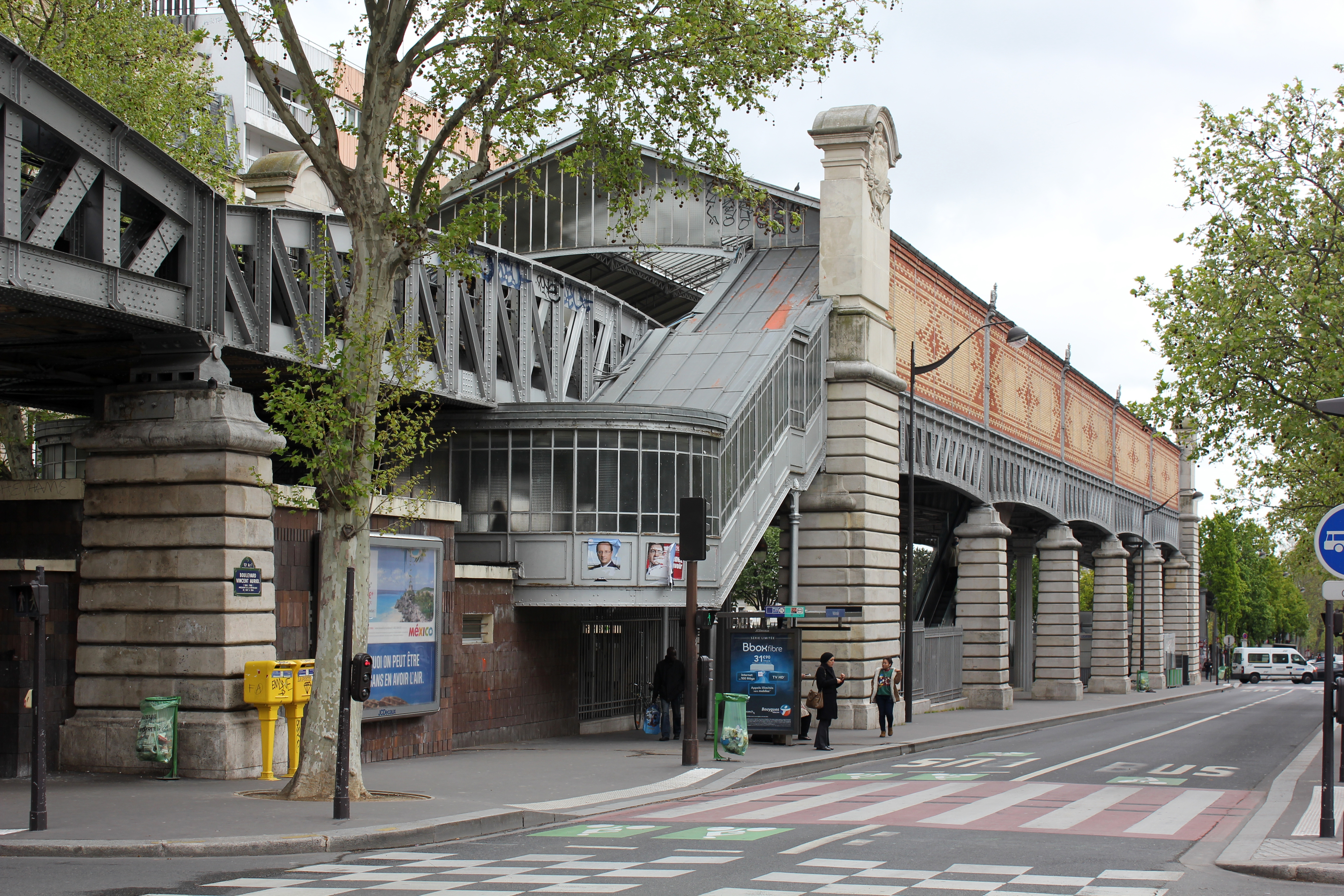 Paris Metro 6 Nationale